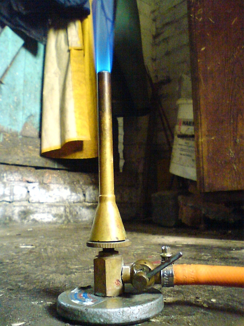 Palnik z zapalonym płomieniem z otwartym wlotem powietrza.